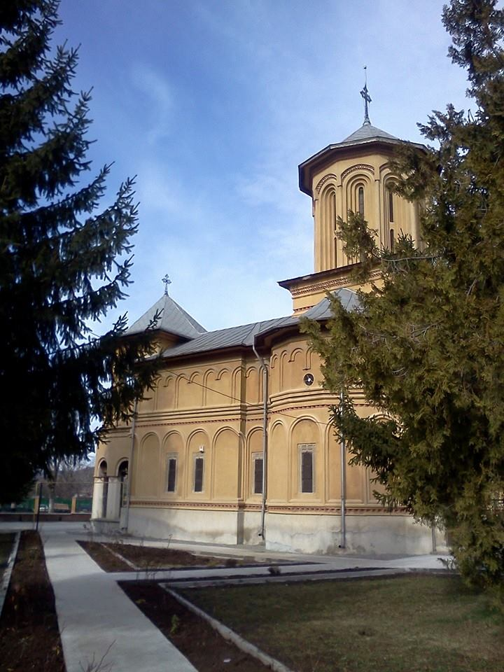 Biserica „Sf. Trei Ierarhi” (1688) sat Filipeștii de Pădure; comuna Filipeștii de Pădure